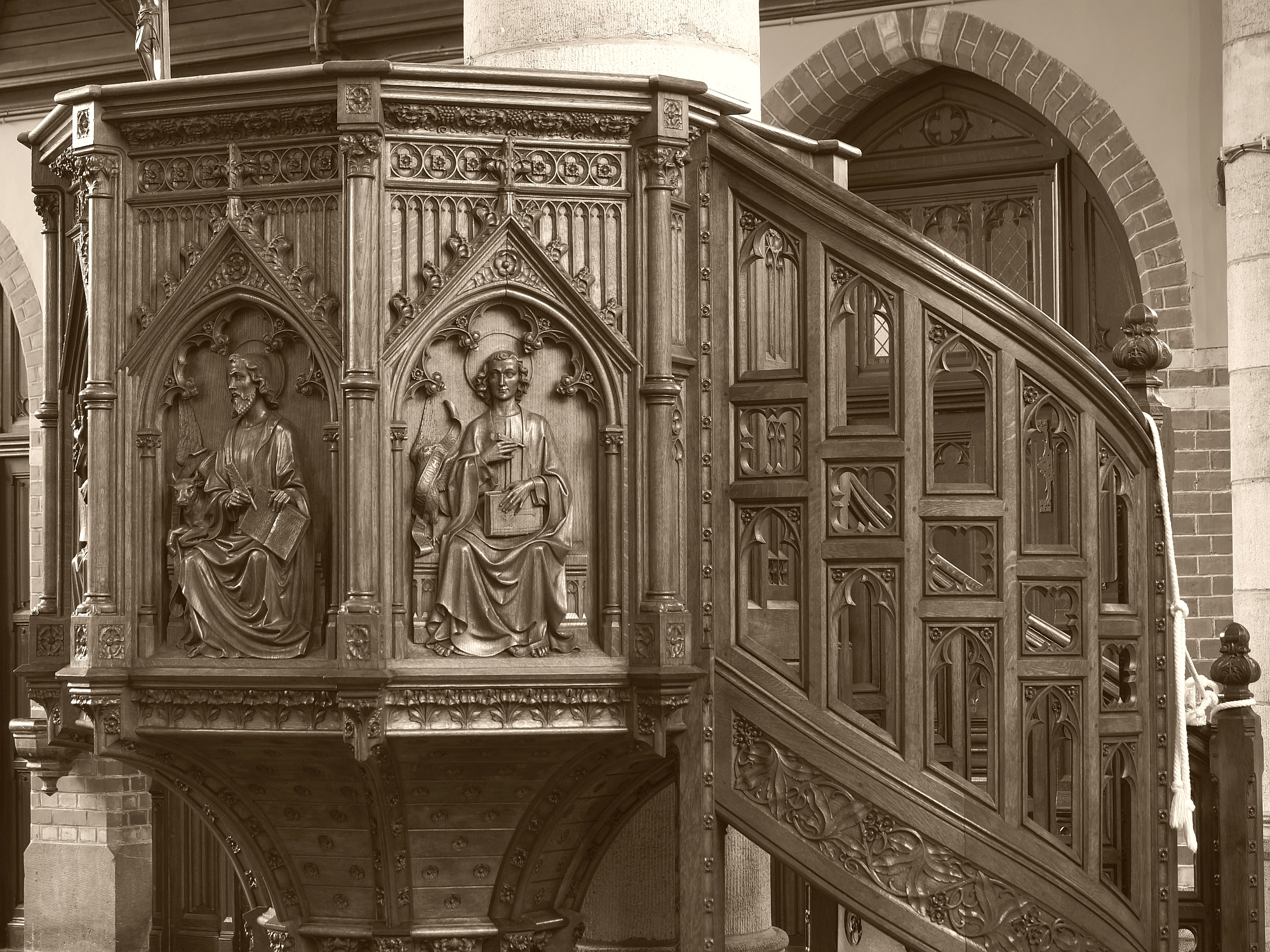 Preekstoel in de Onze-Lieve-Vrouw van Bijstandkerk te Aalst, gebeeldhouwd door Remi Rooms.